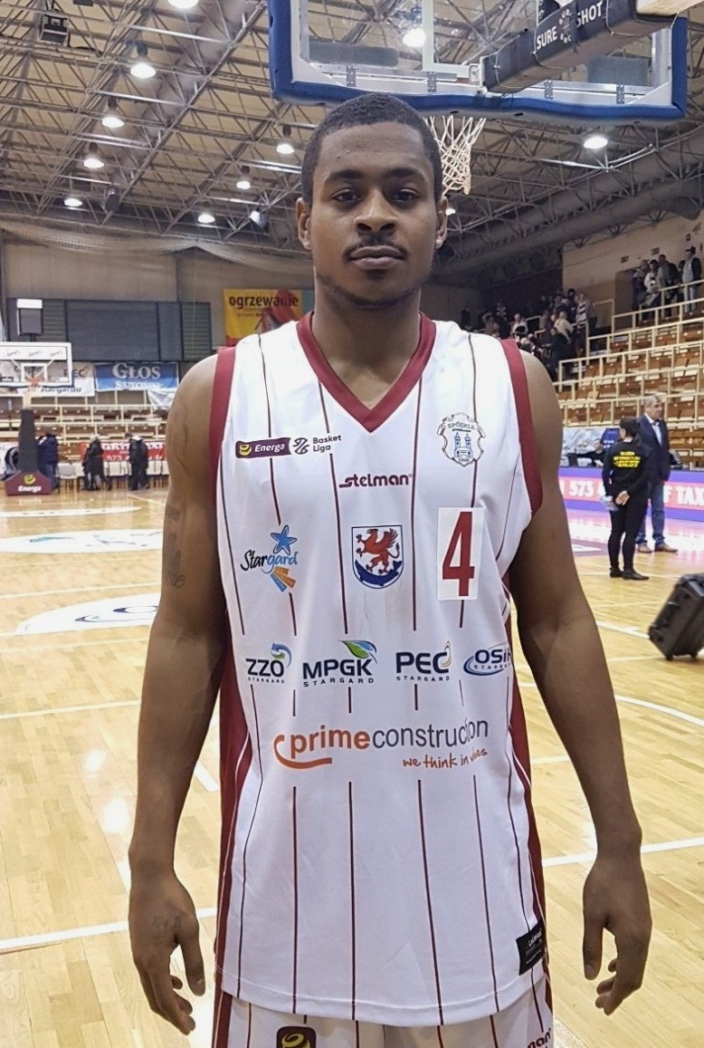 Roderick Camphore (3.01.2019)